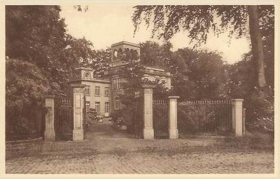 Portail d'entrée au château "les Fayards" à Pelderijnstraat 54, Sainte Croix-les-Bruges. Fayards, synonyme de hêtre.